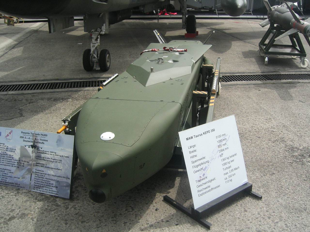 Taurus Marschflugkörper auf der ILA 2006